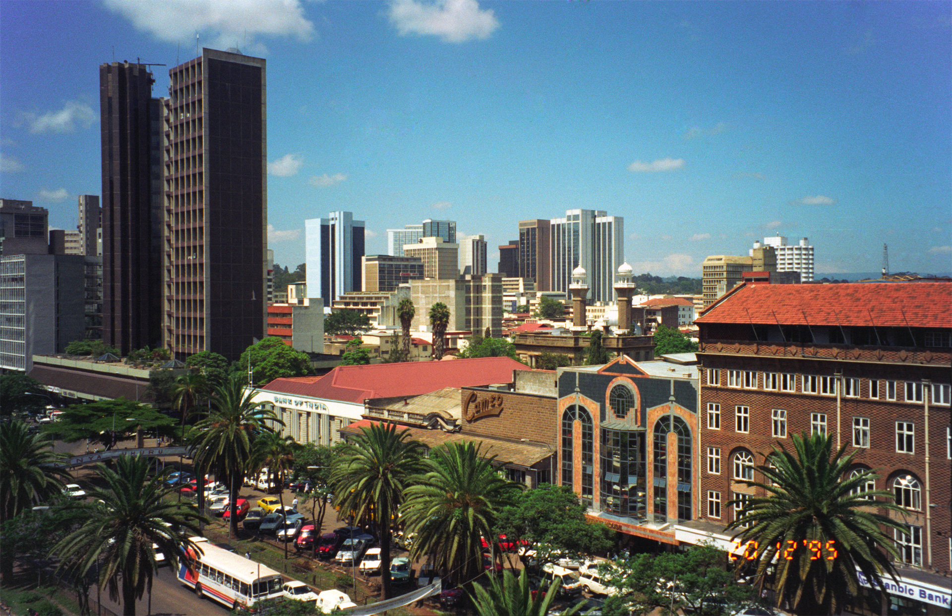 Kenyatta Avenue, Nairobi, Kenya